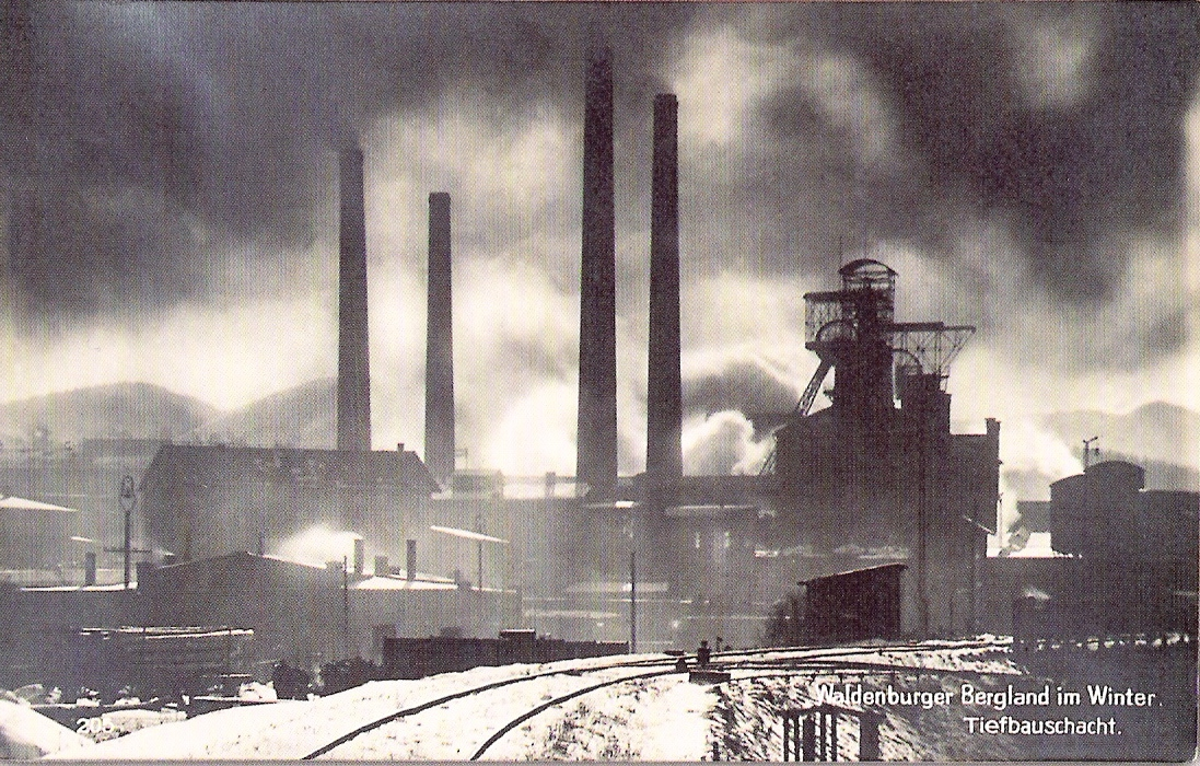 Kopalnia Tiefbau (Maria)Założona i przez wiele lat w rękach Hochbergów zabytek klasy zerowej, rozpoczeła działalność w 1875, przed 1945 wstrzymano w niej wydobycie z powodu sąsiedztwa centrum Wałbrzycha, ostateczne zrównana z ziemią w roku 1964 - widok z 1926 roku.